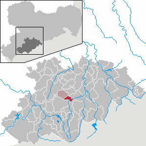 Tannenberg im Erzgebirgskreis, Sachsen